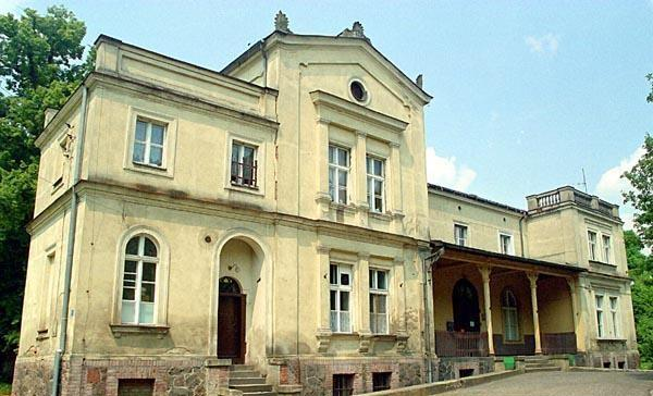 Dwór w Nekli (zabytek nr rejestr. 1445/A) Polska